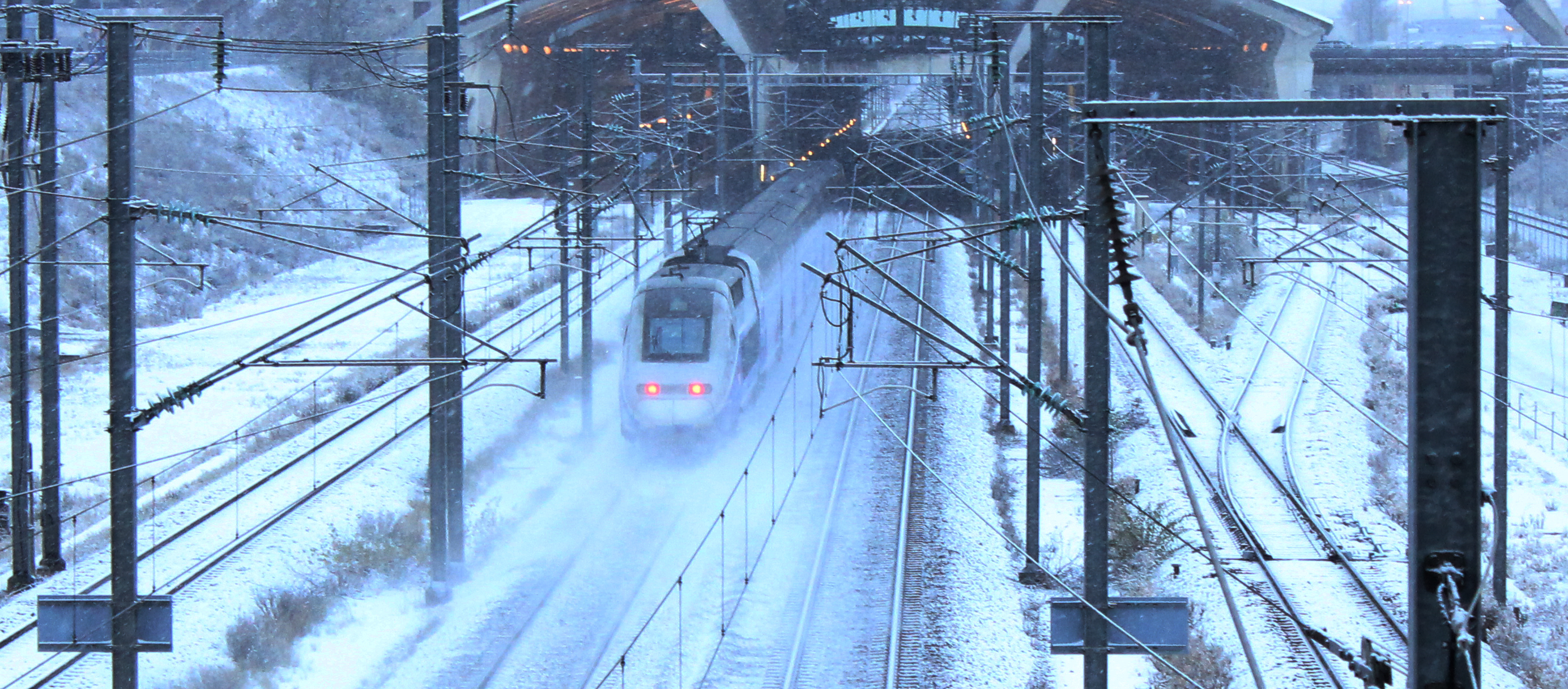 Un TGV en direction du sud, passant sous le "Tube 300" de Saint-Exupéry